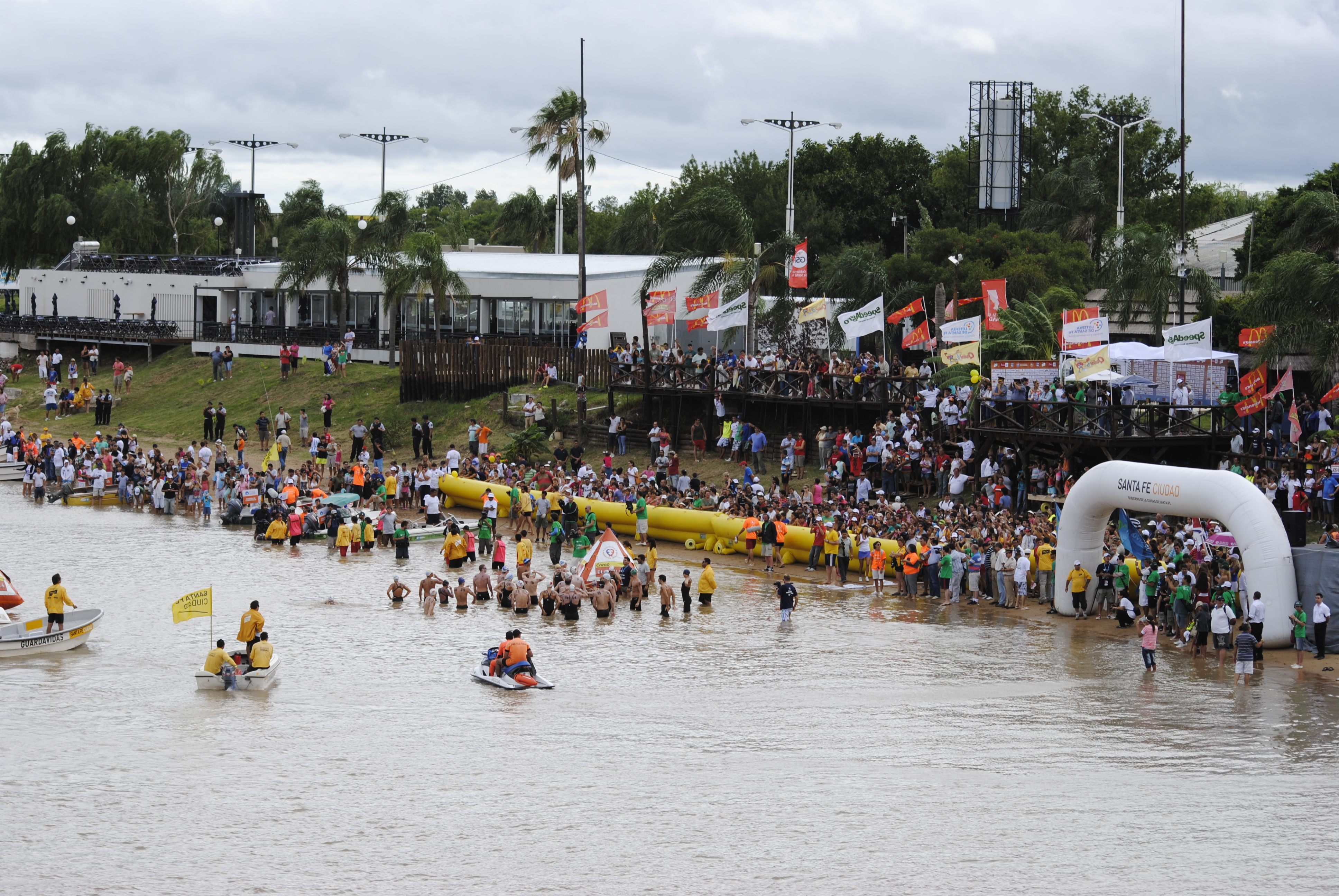 Largada Santa Fe - Coronda 2014. Laguna Setúbal, Santa Fe, Argentina.